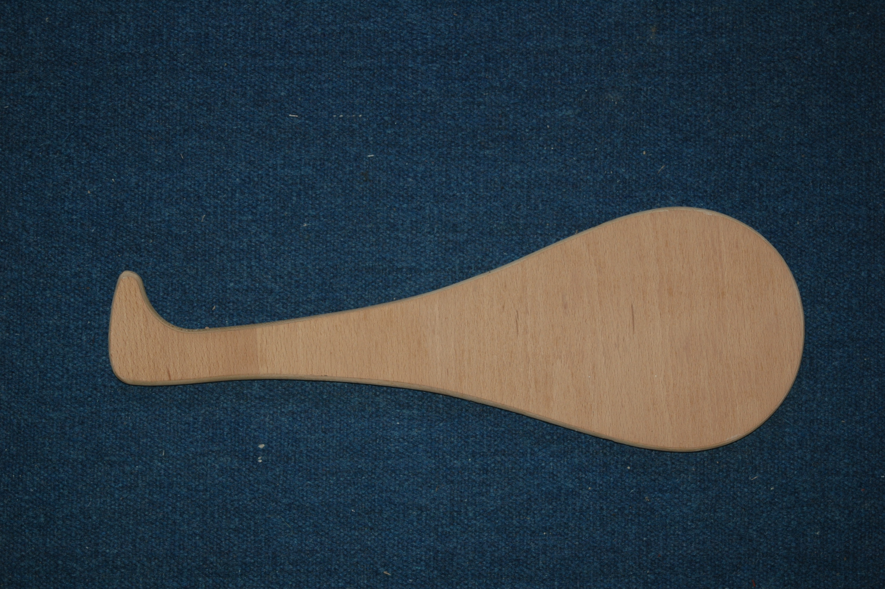 Paleta corta